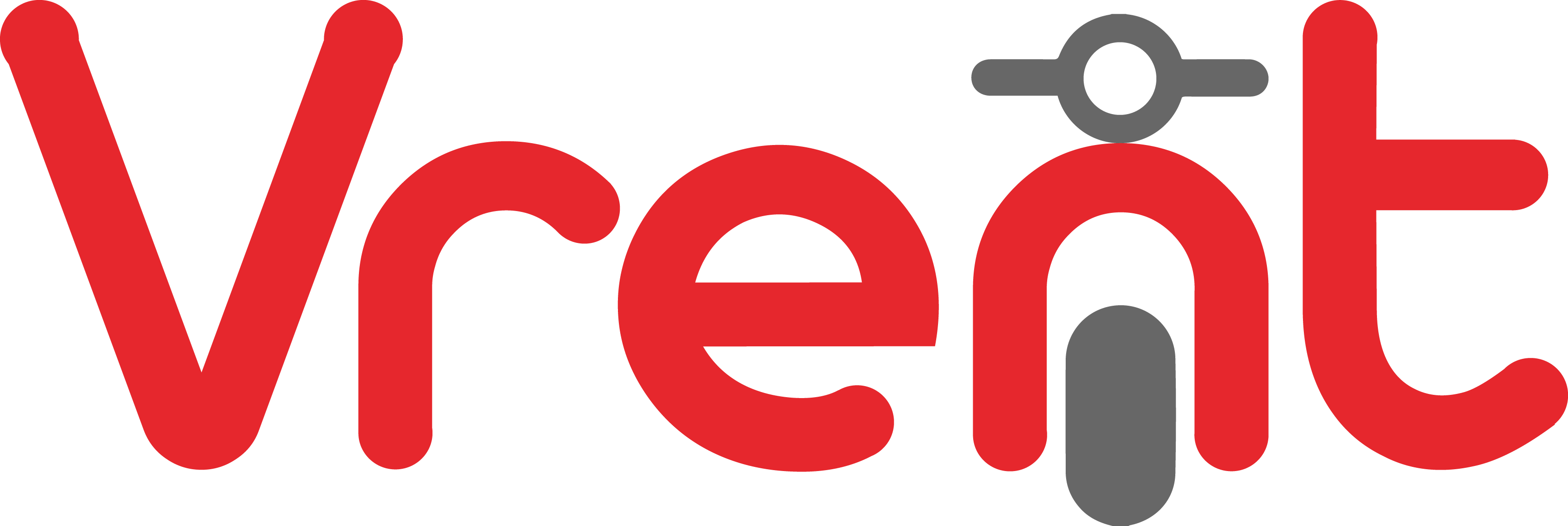 Logo Vrent layanan sharing motor listrik Indonesia